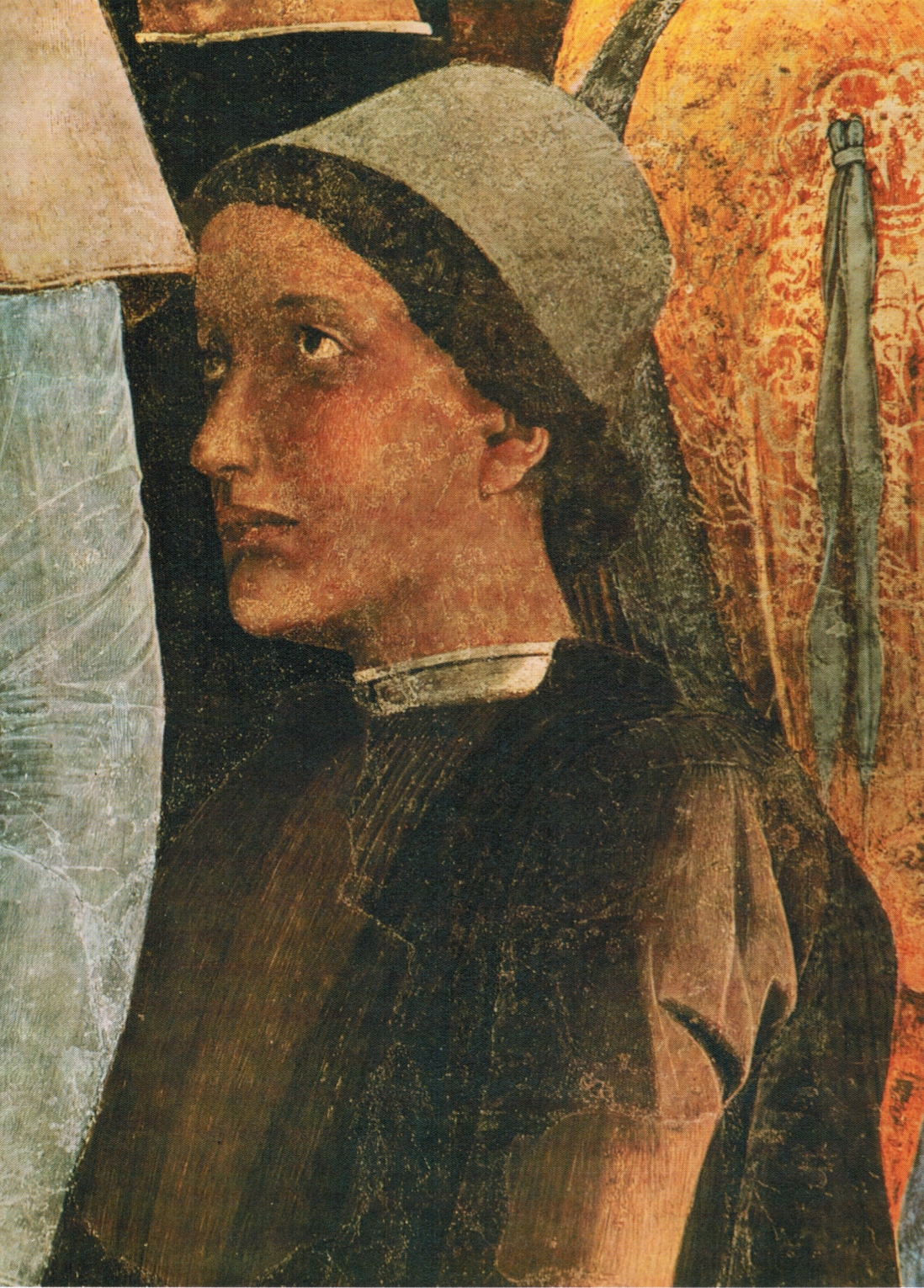 Apostolic pronotarius Lodovico Gonzaga